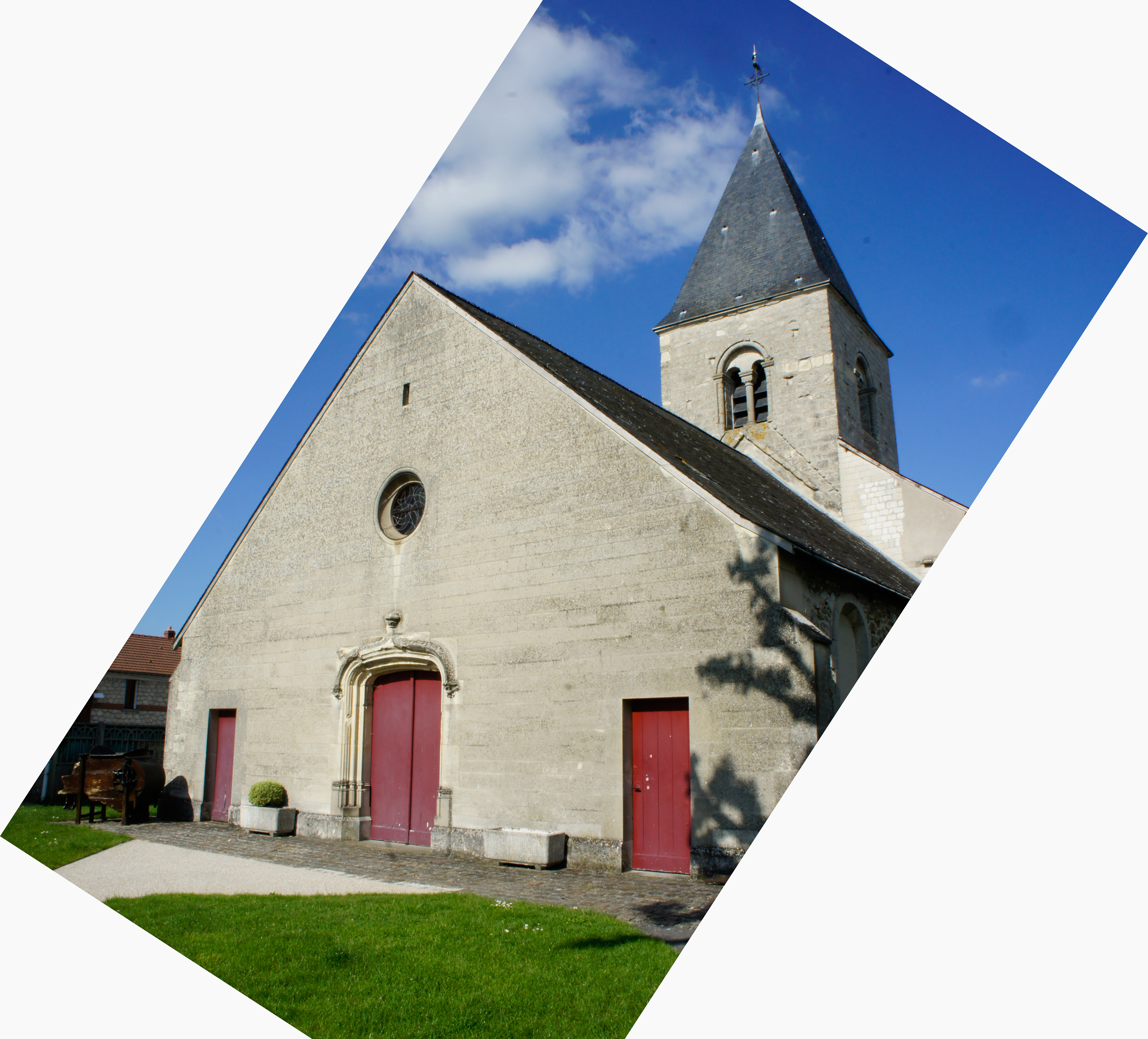 portail occidental de l'Église Saint-Basle de Caurel.